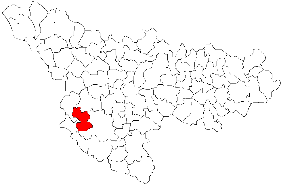 Categorie:Hărţi ale judeţului Timiş